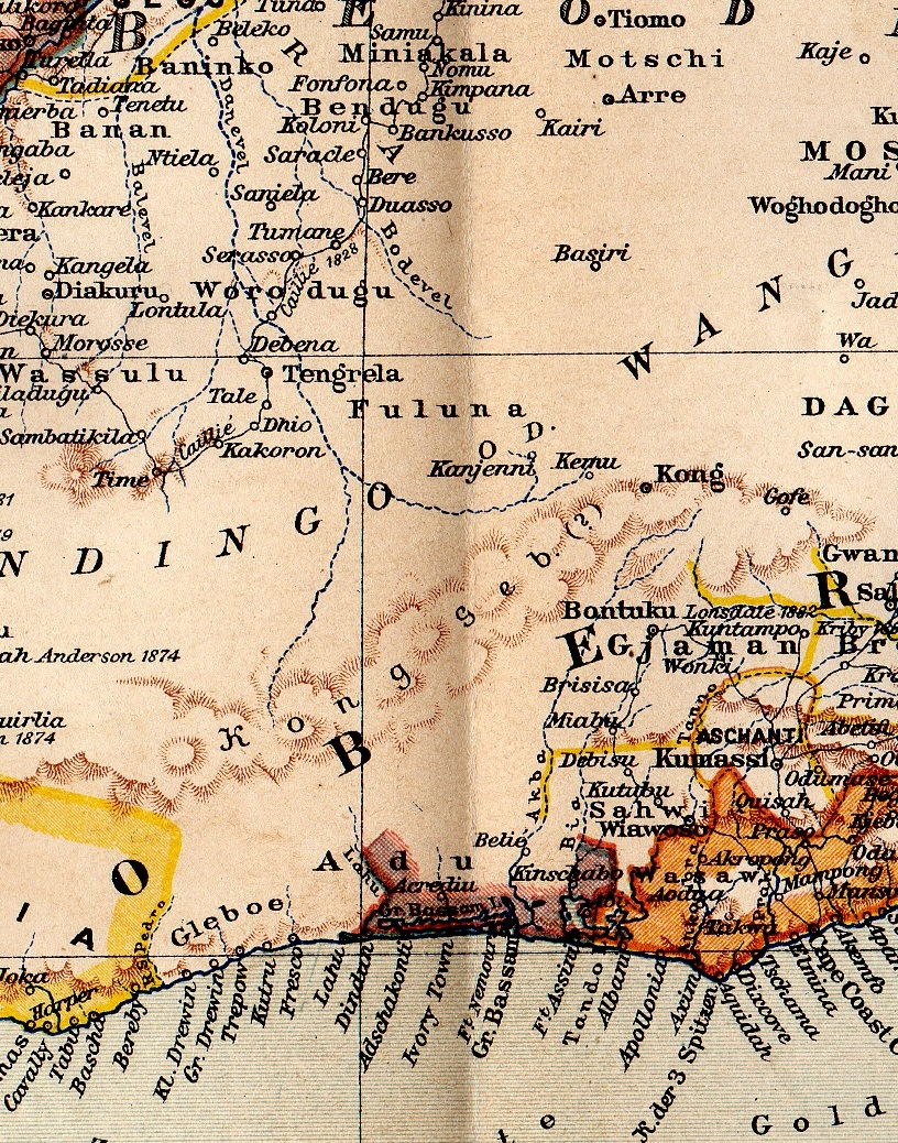 La région de l'actuelle Côte d'Ivoire, telle qu'elle était connue en Europe en 1889 (détail d'une carte allemande au 12.000.000e)